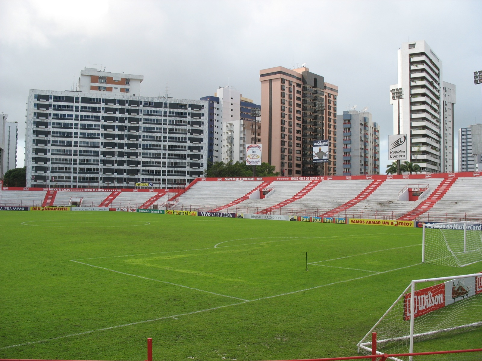 11 de julho de 2008: simpático e acolhedor estádio do Náutico